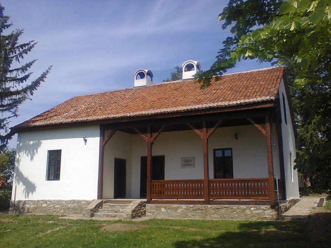 Српски (ћирилица): Родна кућа Радоја Домановића